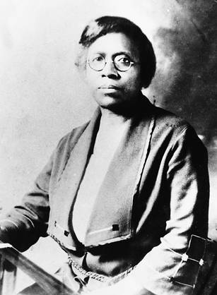 Matilda Evans